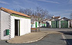 Aler Bahnhof in Les Portes-en-Ré. Foto von dem französischen Pep.per In die Commons geladen von User:Ile-de-re am 27.10.2006